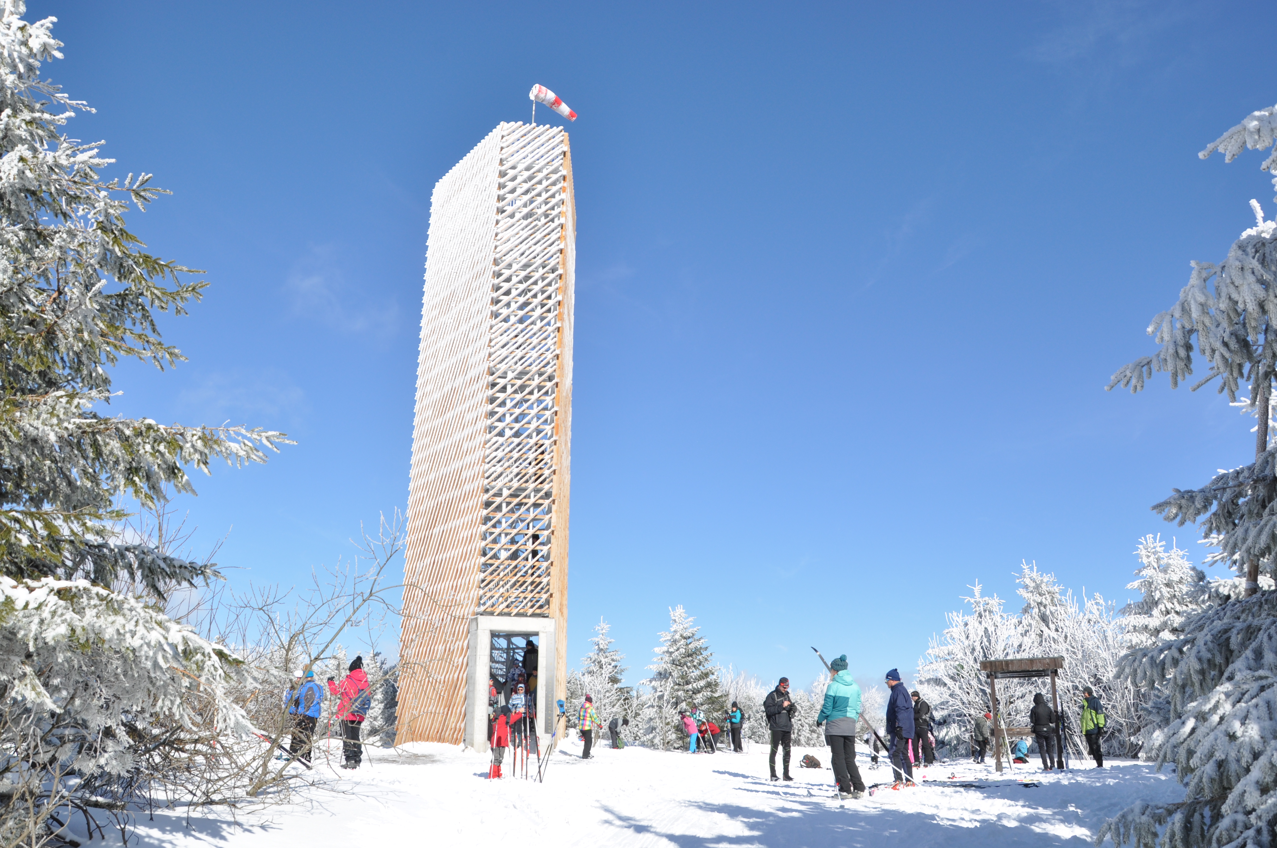 Gipfel der Velká Deštná (Deschneyer Großkoppe) im Adlergebirge, Tschechien. Der Aussichtsturm wurde im Jahr 2019 neu errichtet.